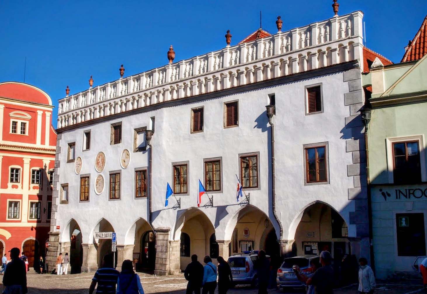 Český Krumlov, náměstí Svornosti